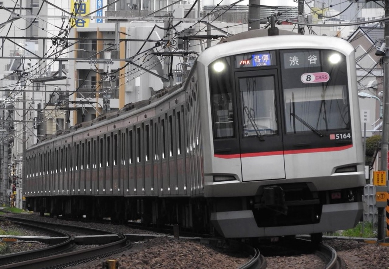 東急5050系5164編成。東急東横線自由が丘-都立大学間。